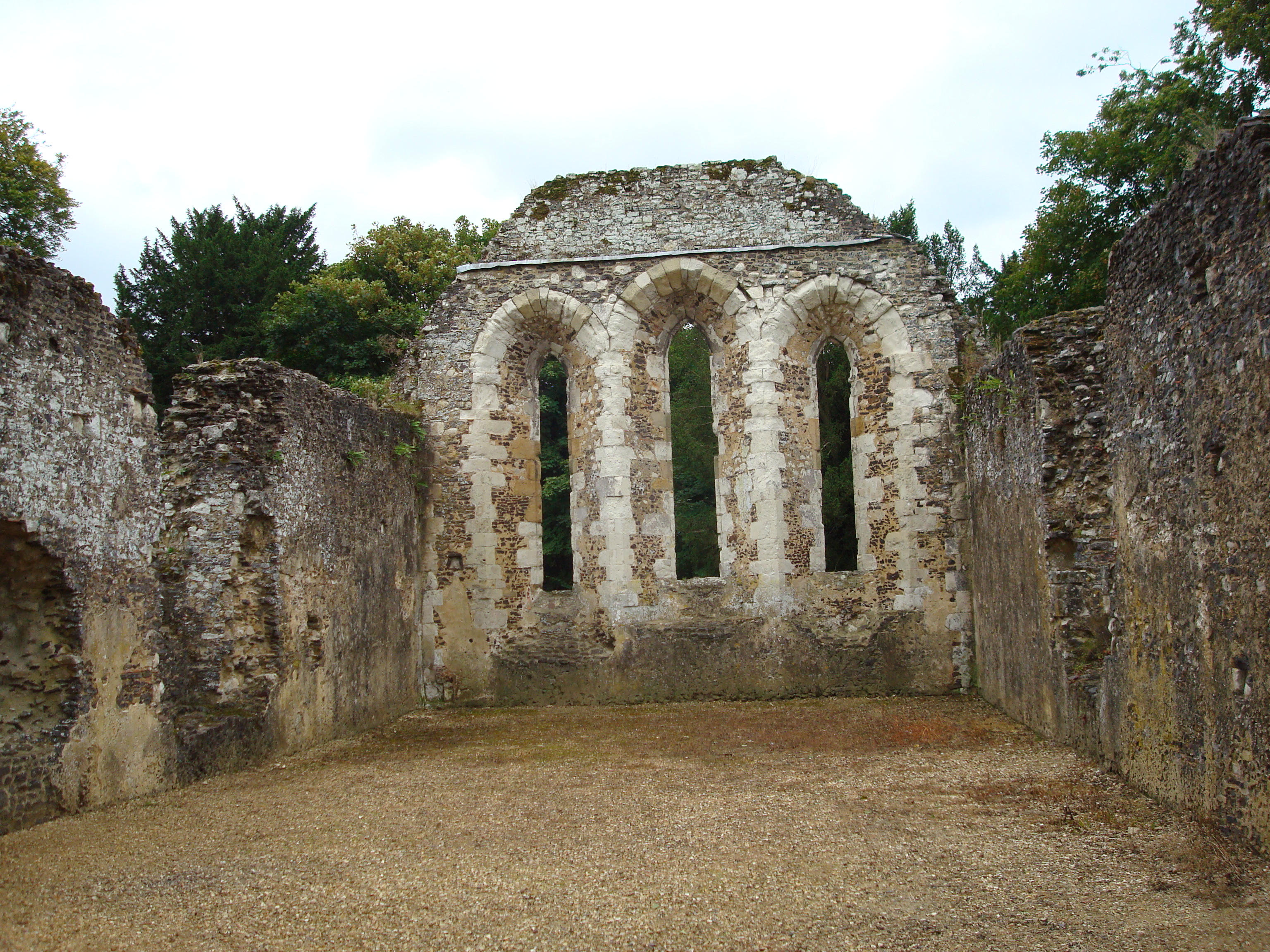 Waverley Abbey